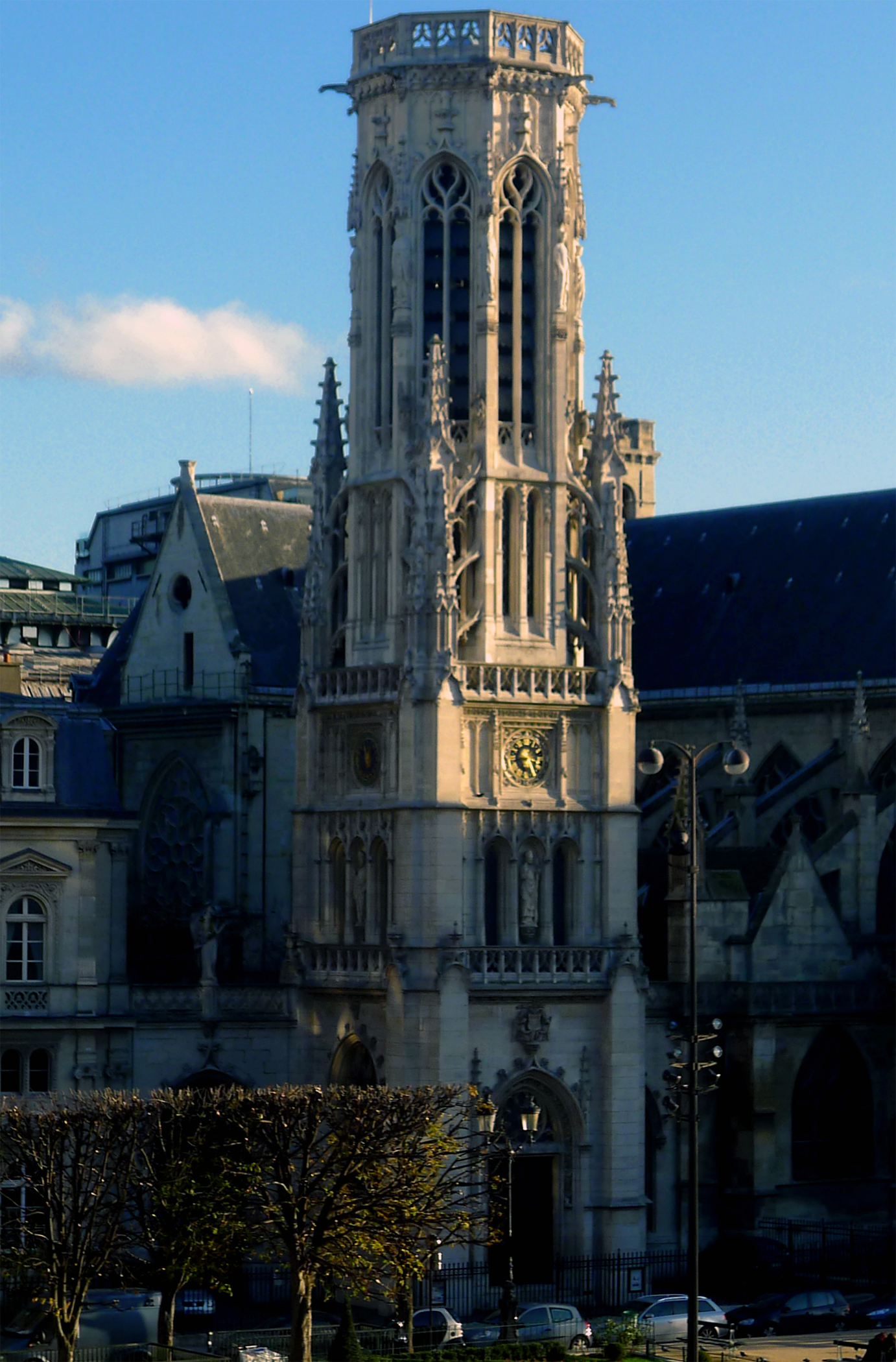 Beffroi de T. Ballu, place du Louvre - Paris Ier